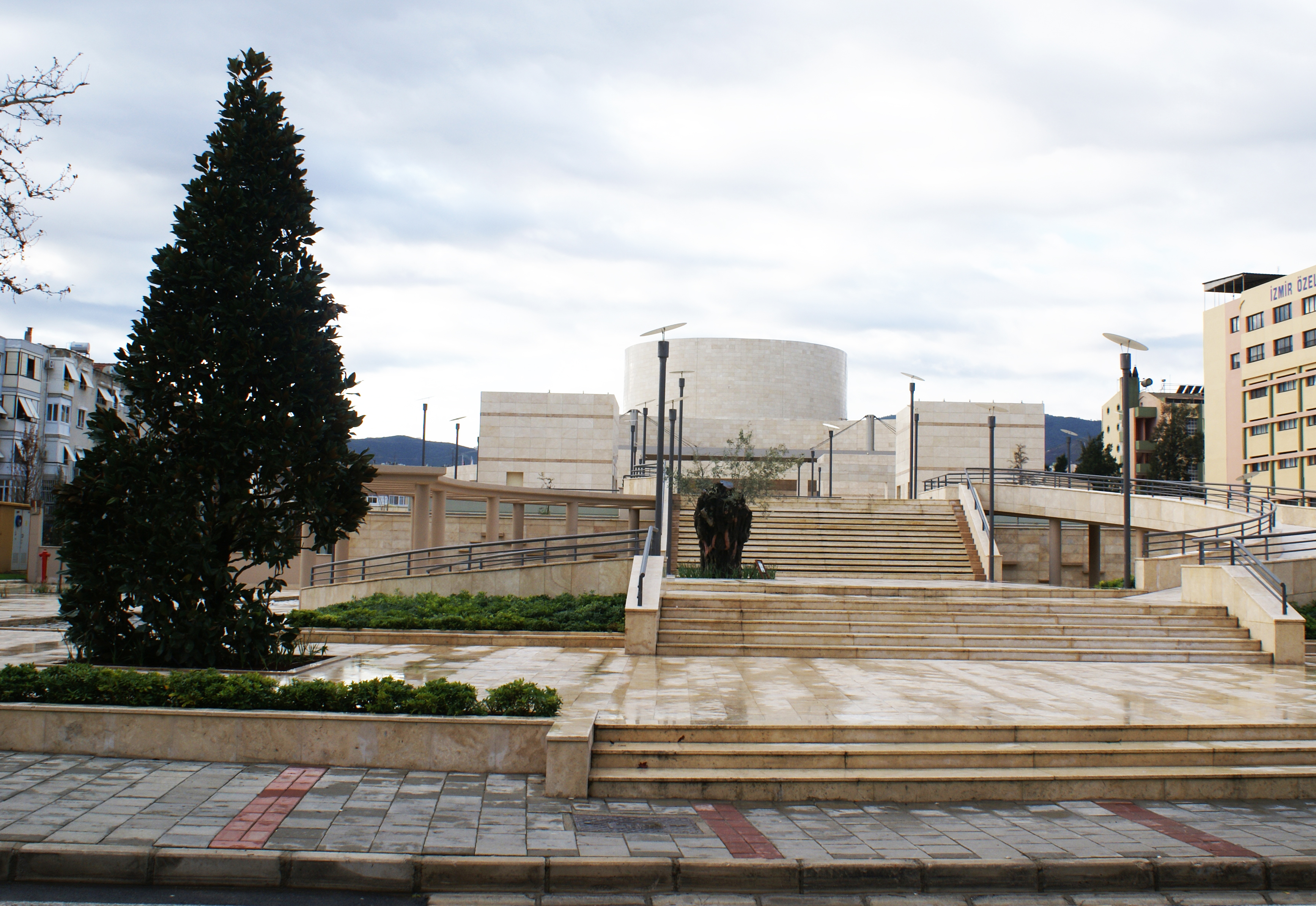 North facade of the complex